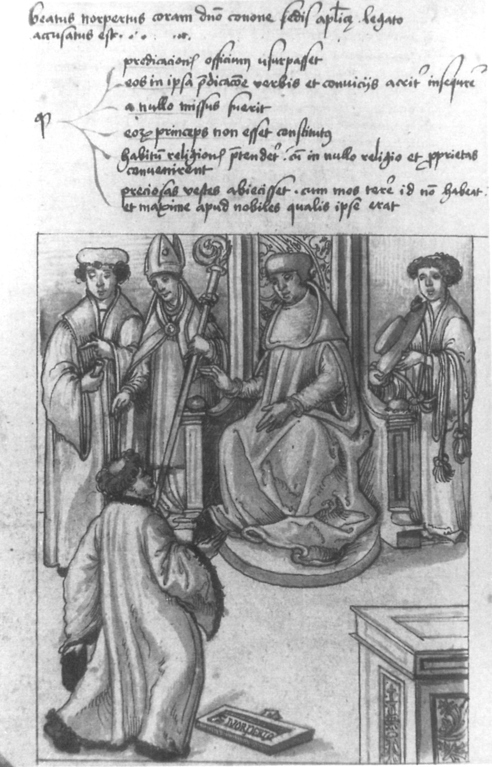 Norbert verteidigt sich bei der Synode in Fritzlar (1118); aus dem Norbert-Zyklus im so genannten Traditionskodex aus Kloster Weißenau, heute Fürstlich Waldburg-Zeil'sches Gesamtarchiv, Schloss Zeil, ZA Ms 41; fol. 4